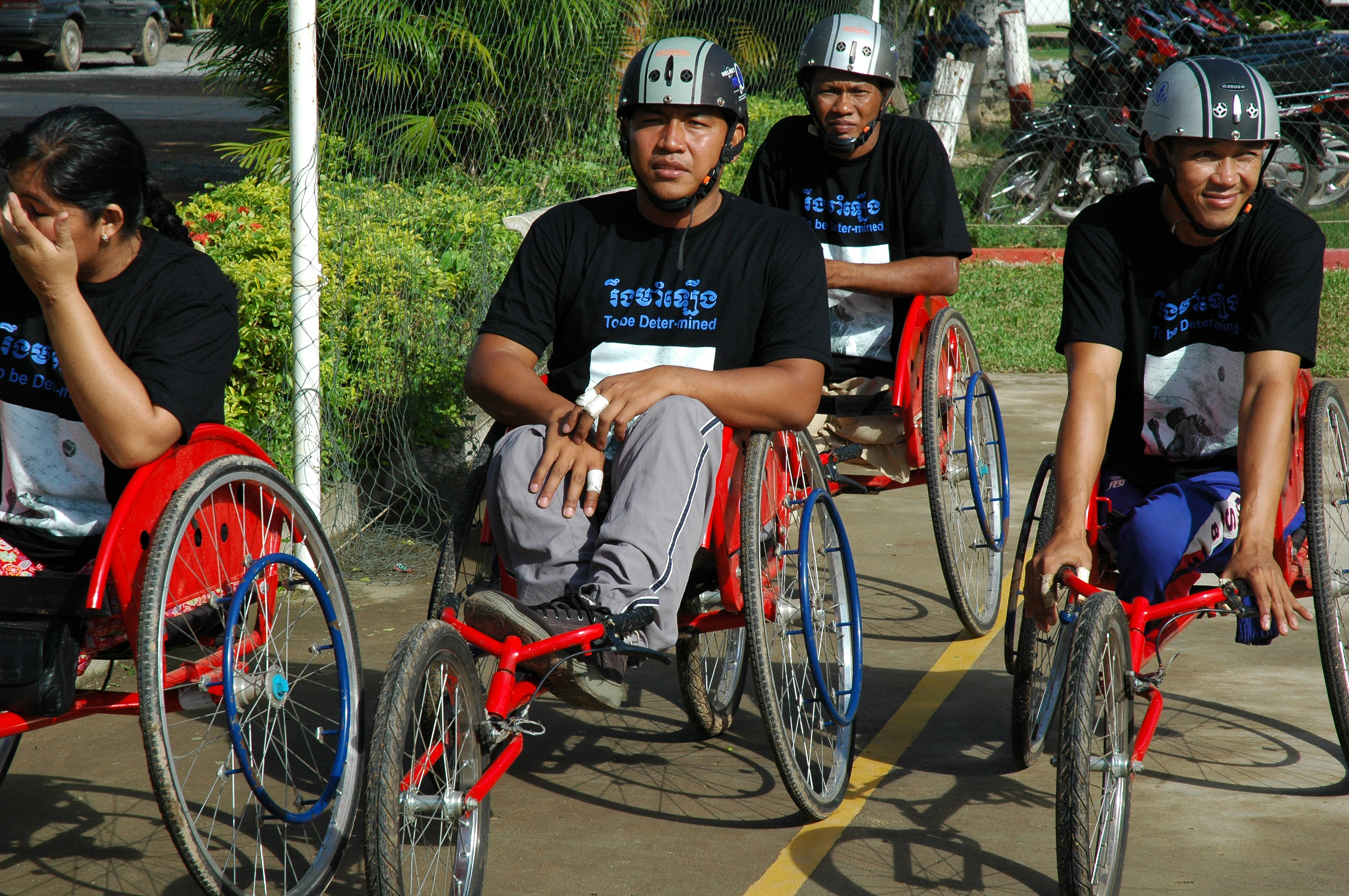 Cambodian volleyball team (landmine injuries). Cambodia 2005.